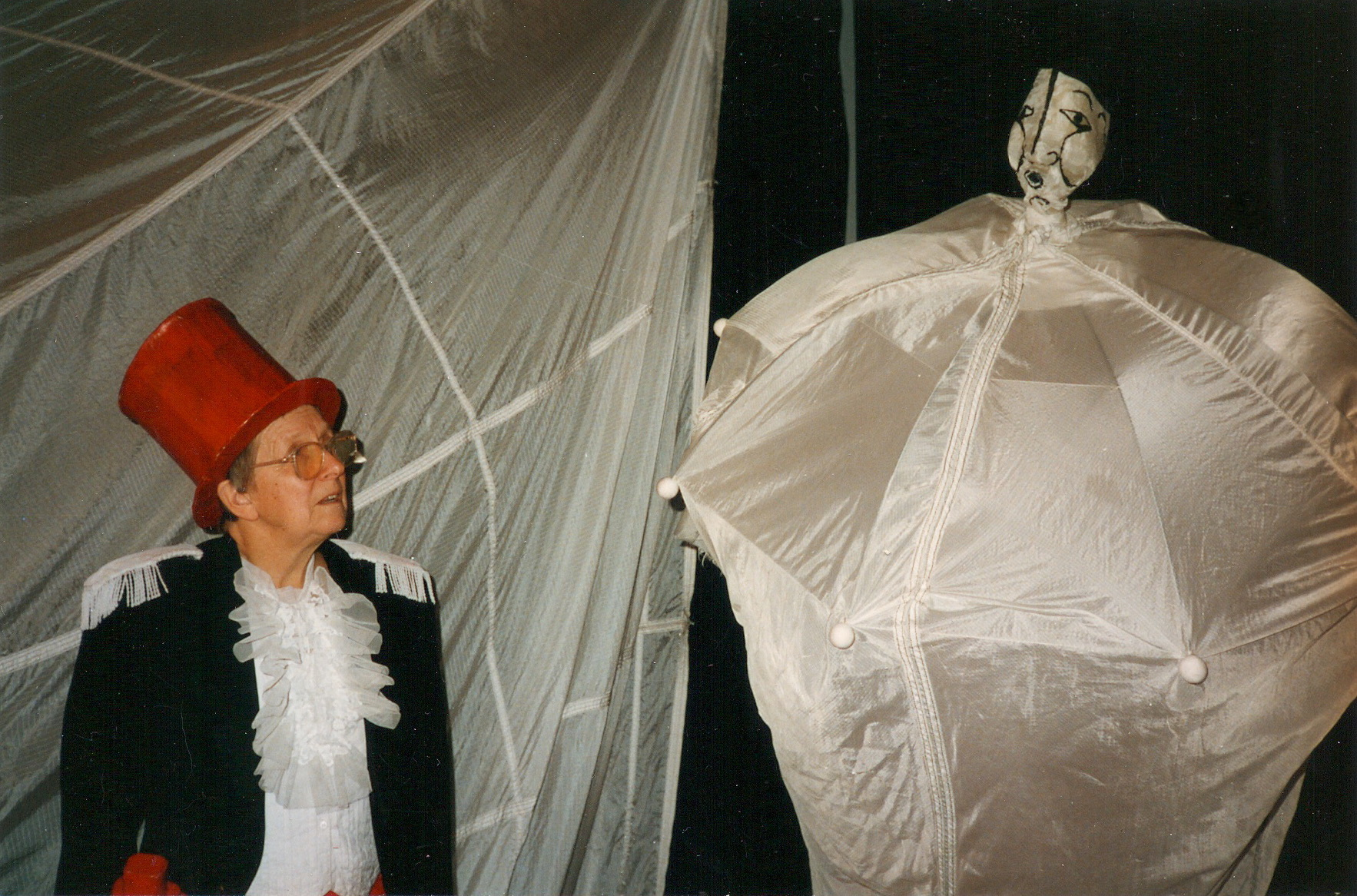 Tromsø dukketeater profesjonelle del 1992 Polarsirkus, sirkusdirektør Randi Nilssen og Lille fjert sønn av Nordavinden. Foto: Brit Steinsvik